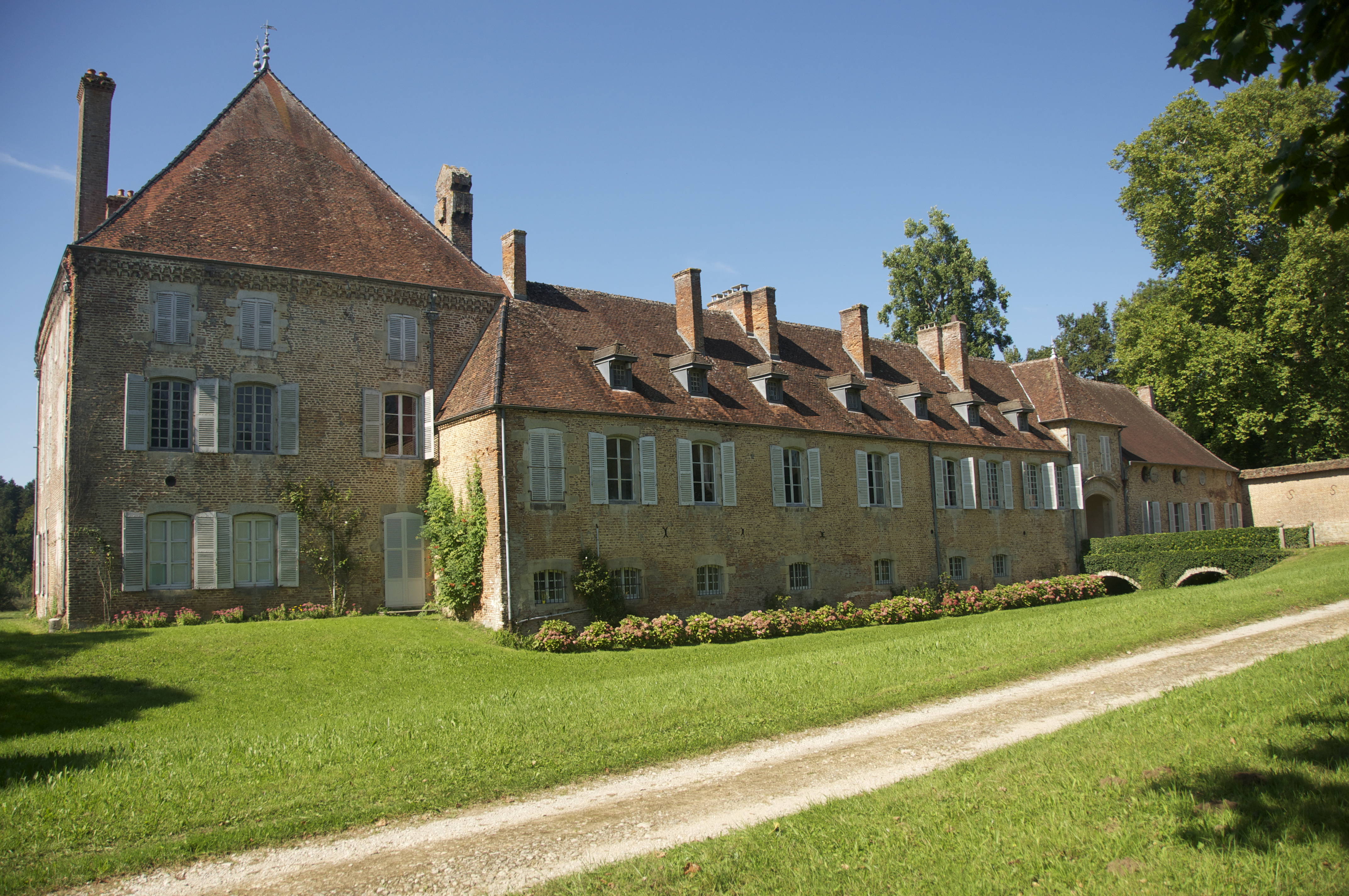 Château de Beaurepaire-en-bresse